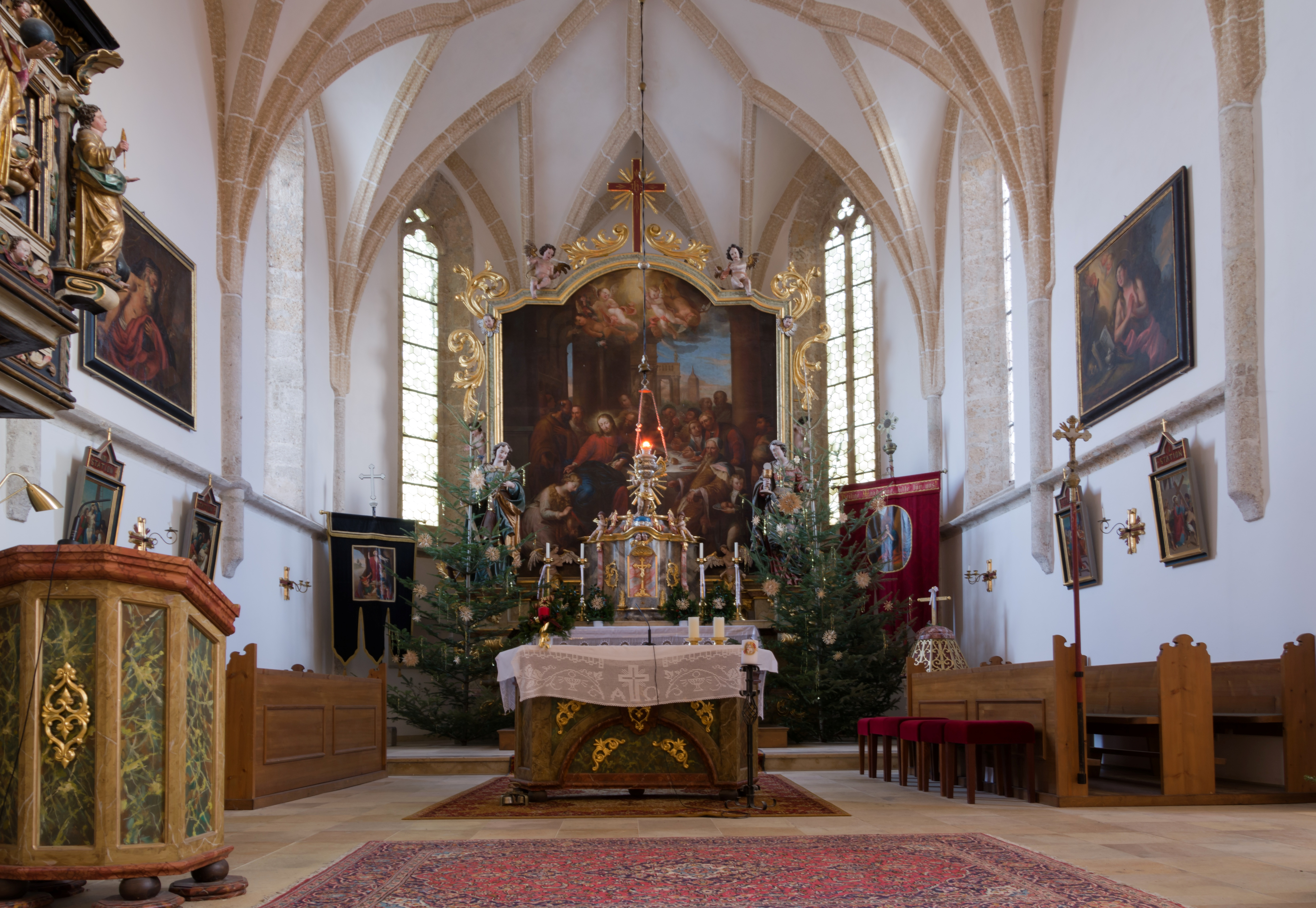 Der Chor der Kath. Pfarrkirche hl. Magdalena in Pettenbach